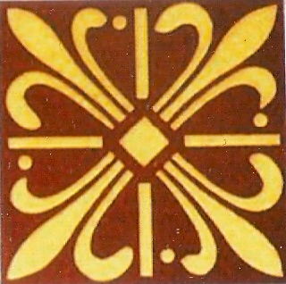 En 1836, lorsqu'on creusa les fondations du presbytère on trouva à 5 mètre de profondeur un carreau qui provenait du couvent de Saint-Joseph à valpronfonde. Ce couvent créé dans la maison d'un bourgeois par Monseigneur de Bellegarde en 1643 a disparu avant la révolution pour cause de Jansénisme. La première supérieure fut Marie de Belleciel et la dernière Madame du Fourny, elles disposaient d'une chambre dont le carrelage emmaillé était semblable à celui qui fut retrouvé.